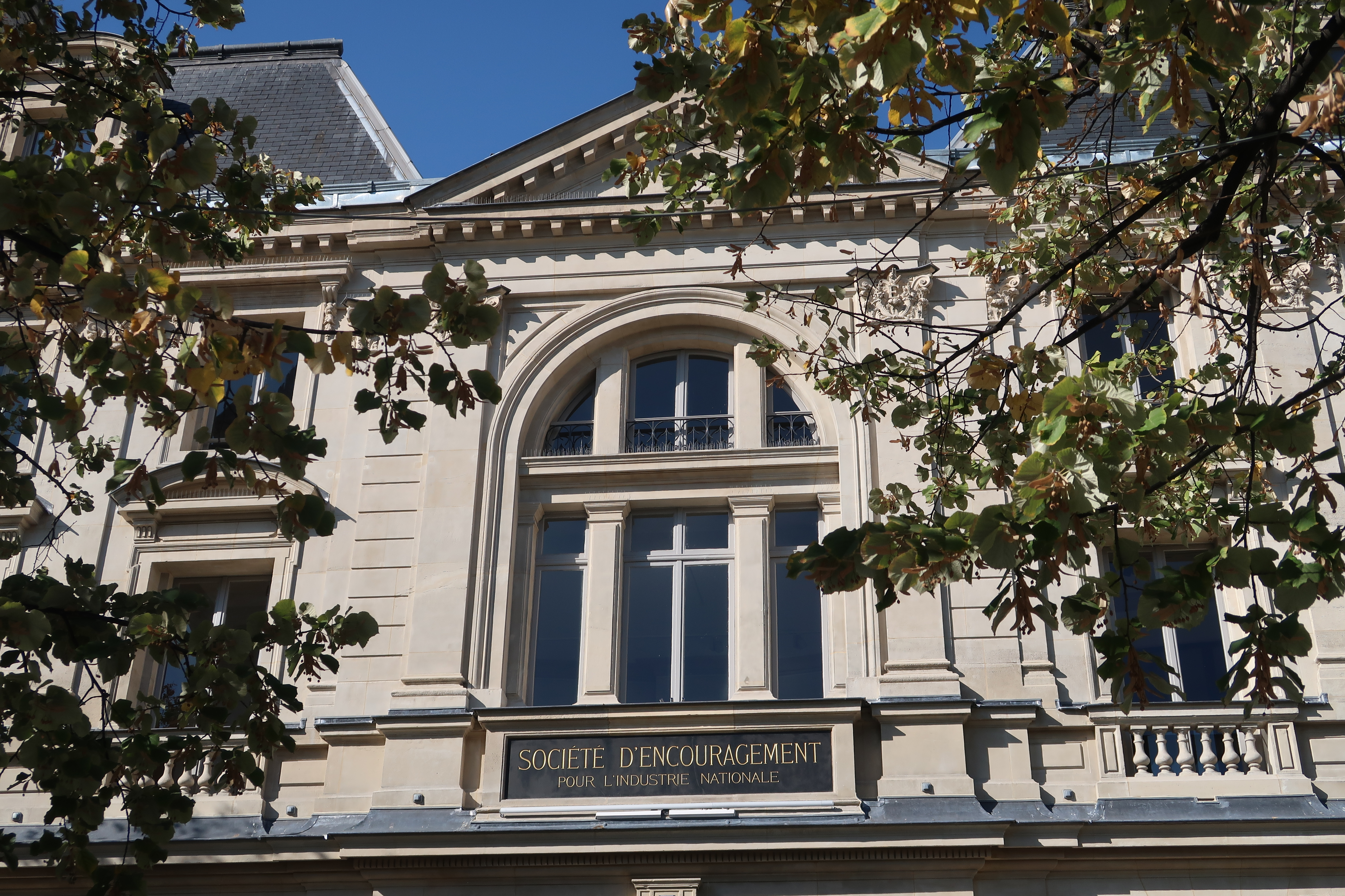 Haut de la façade du 4 place Saint-Germain-des-Prés (Paris, 6e).